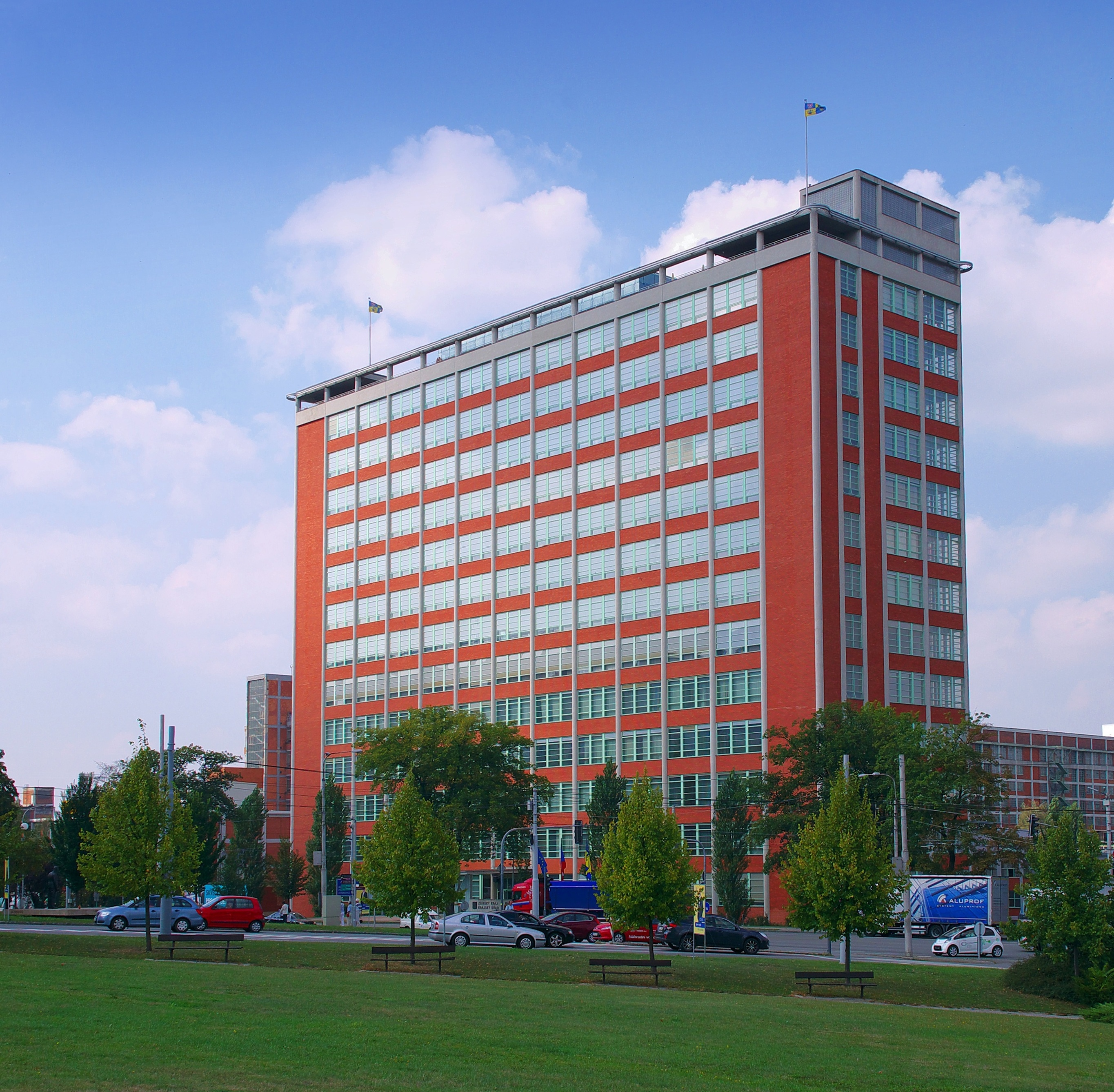 Jiná správní stavba - Baťův mrakodrap (Zlín), Zlín 21